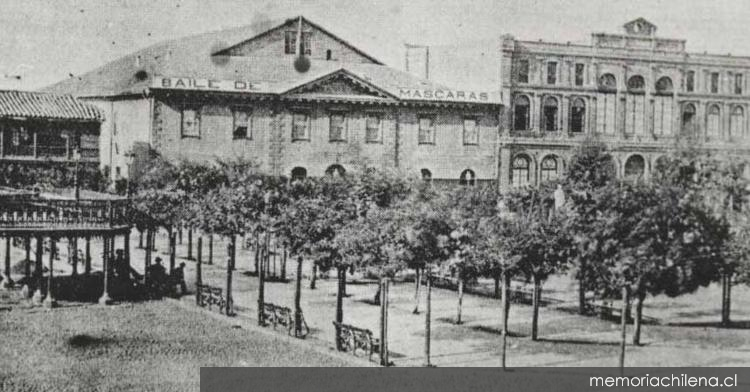 Foto del primer Teatro Victoria de Valparaíso